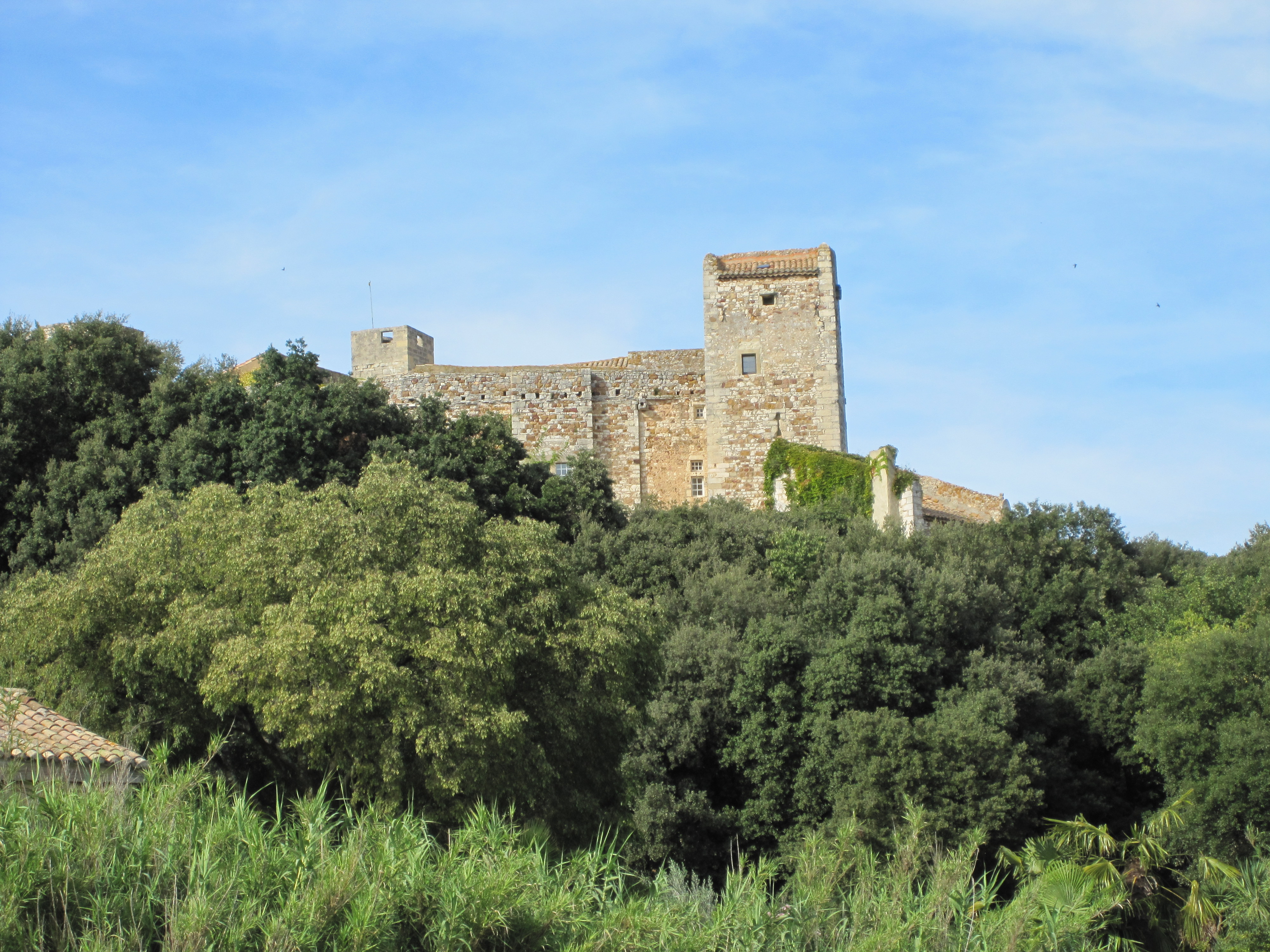 Die Burg von La Capelle-et-Masmolène.